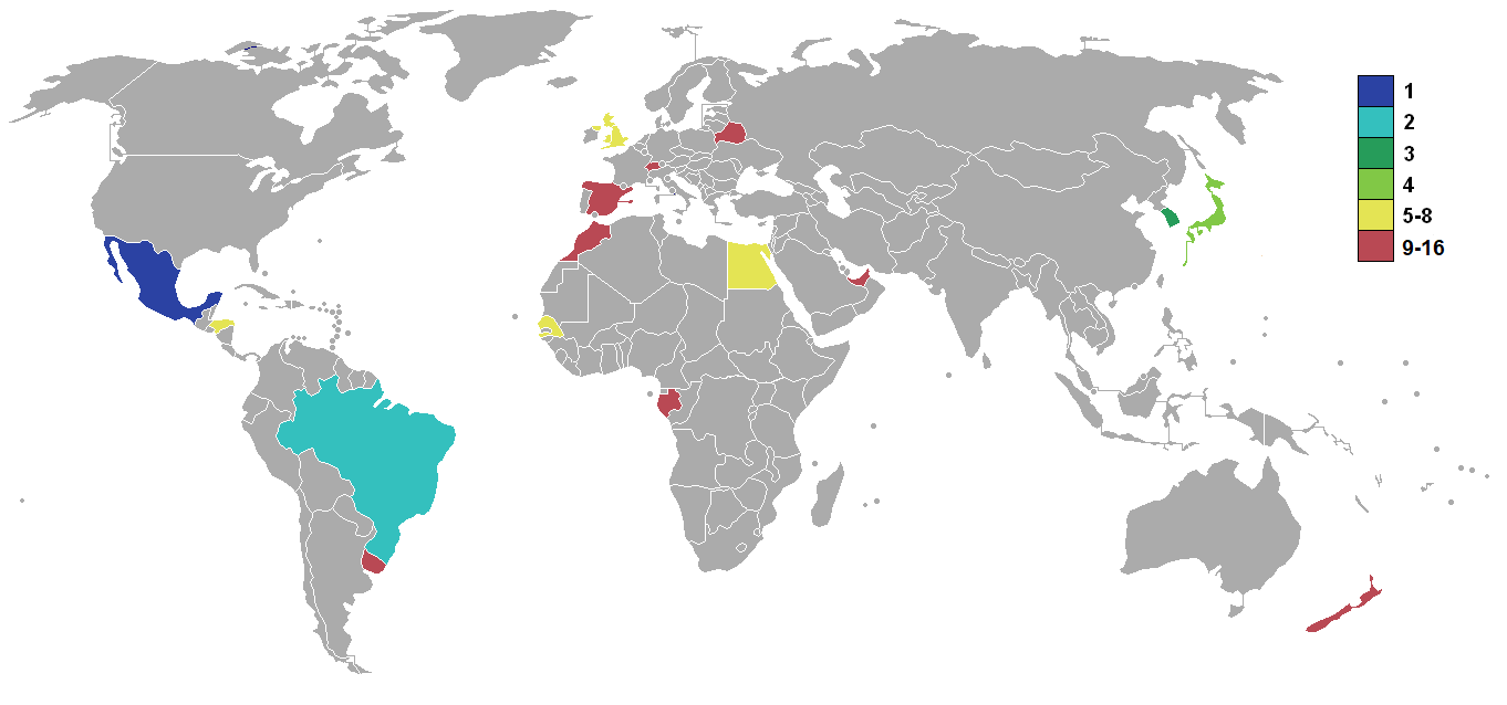 Mapa de los resultados